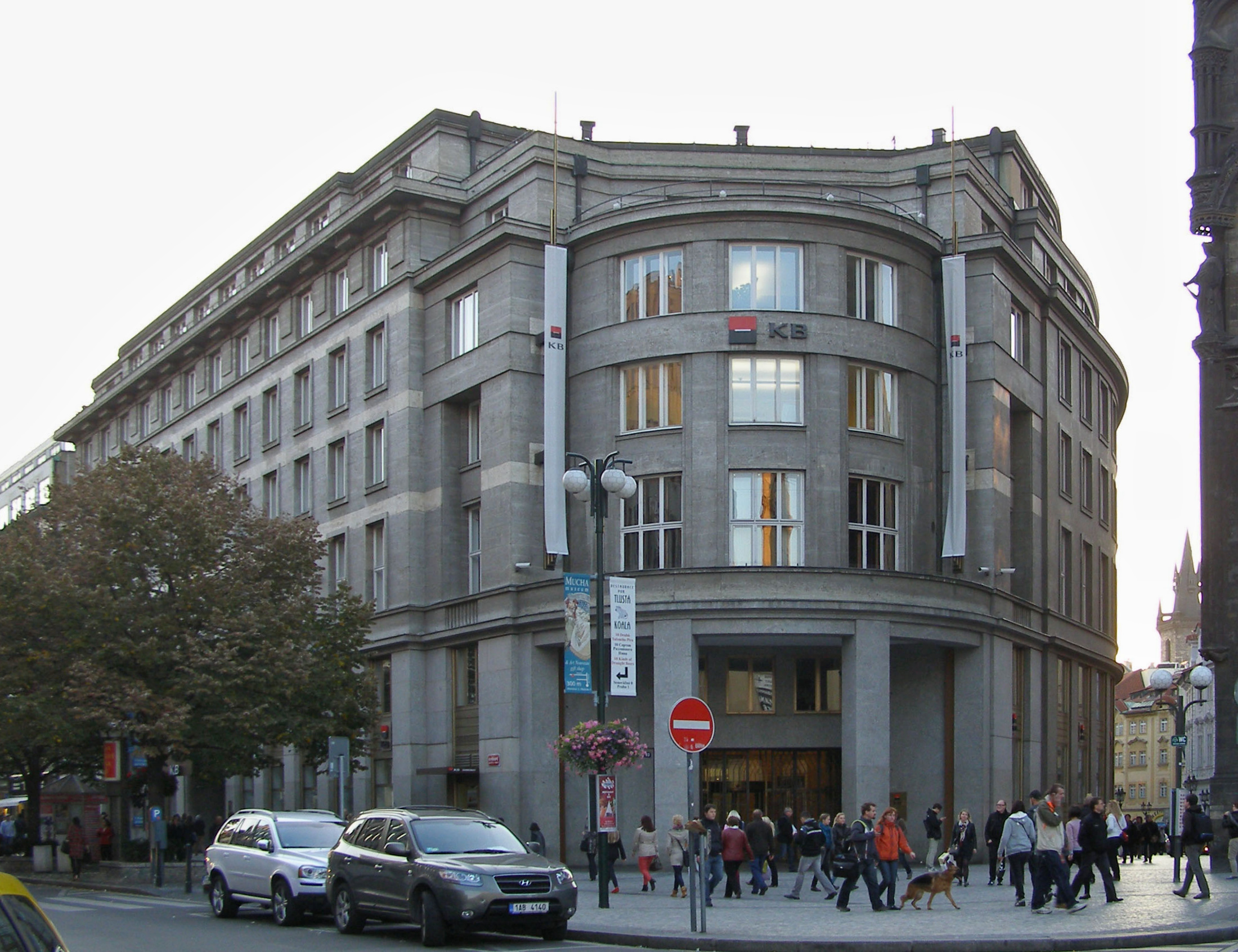 Česká eskomptní banka a úvěrový ústav, Praha 1-Staré Město, č. p. 969, Na příkopě 33, 35, Celetná 40, Autoři: Karl Jaray, Josef Sakař, Rudolf Hildebrand, Ernst Gotthilf, Alexander Neumann, 1930-1932